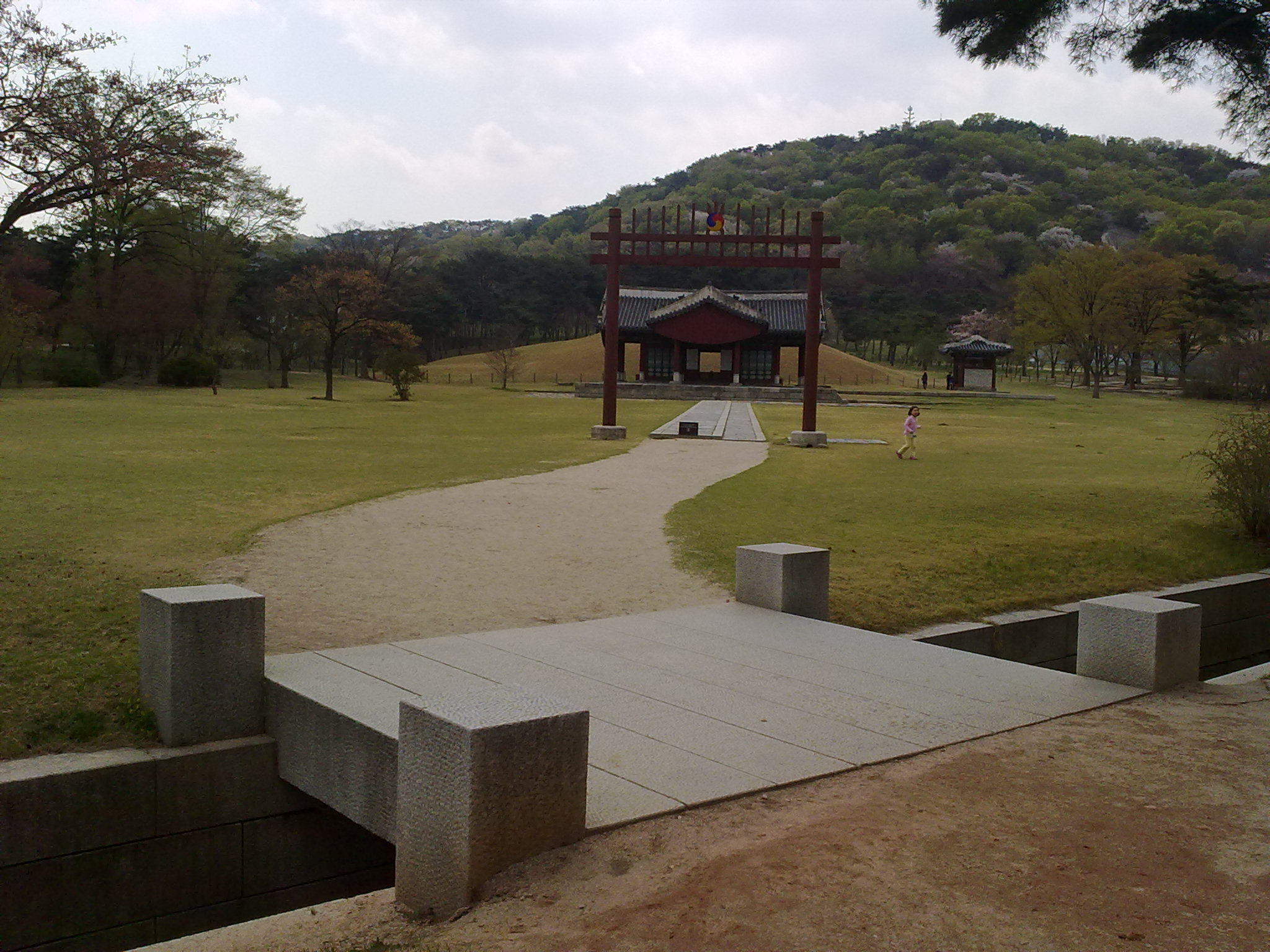 의릉 (조선 경종)의 금천교, 홍살문, 정자각, 비각